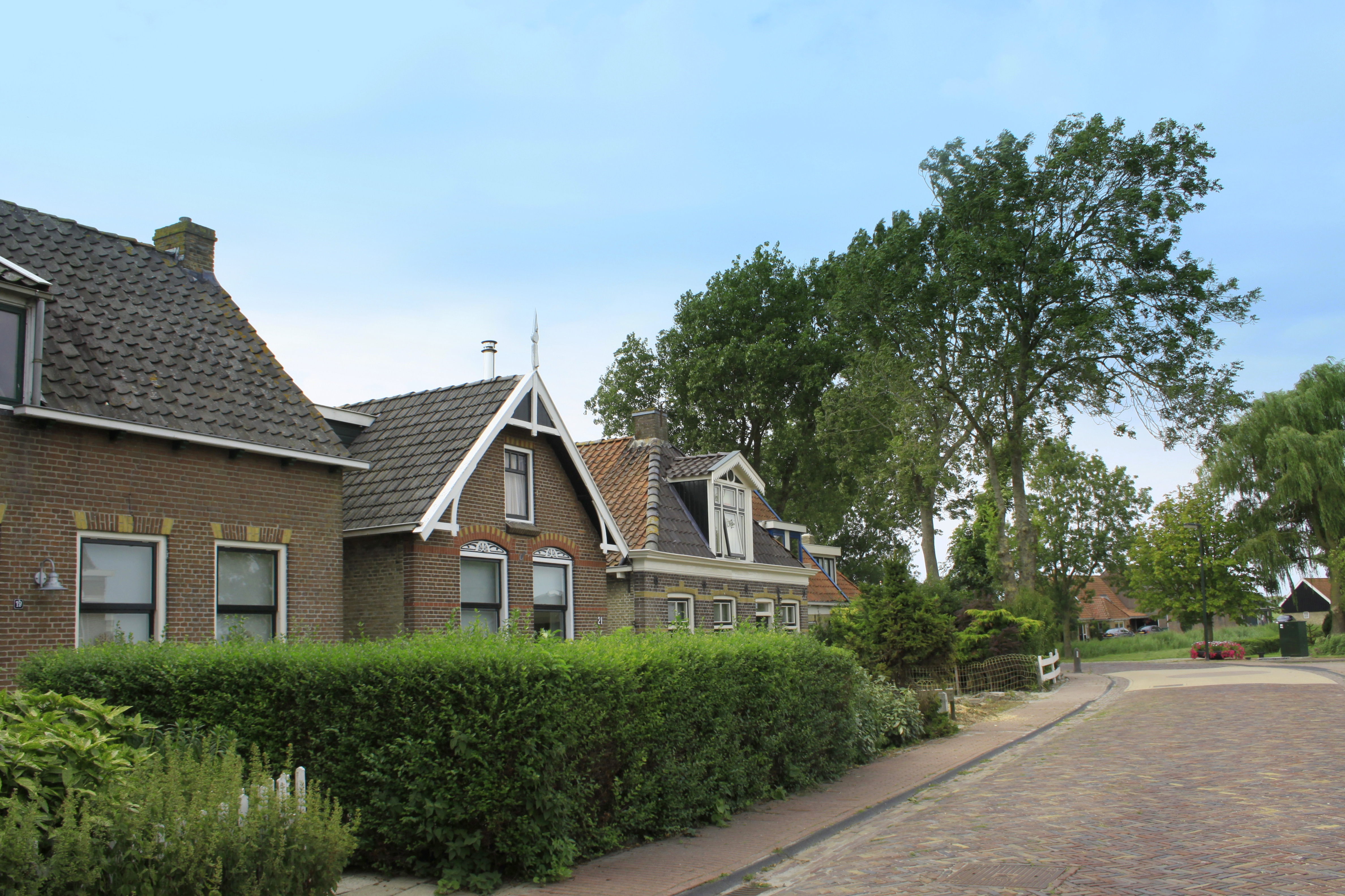 In Idsegahuizem op de Dorpsweg. Idsegahuizum heet in het Fries kortweg Skuzum.